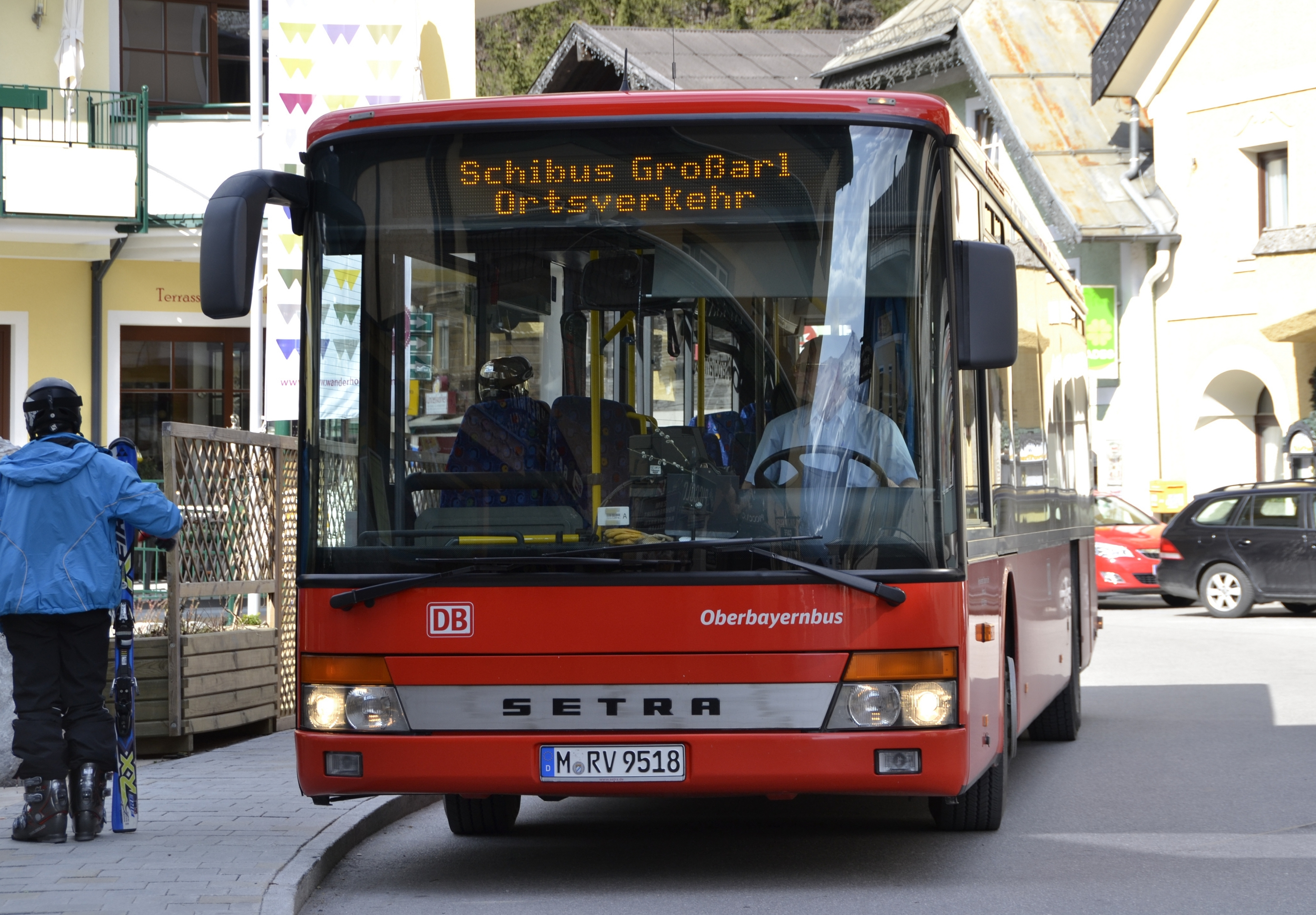 Der Schibus des Ortes Großarl in Österreich. Es handelt sich hierbei um einen Regionalbus (Oberbayernbus) aus Oberbayern, der von der Gemeinde Großarl für eine Wintersaison gemietet wird.